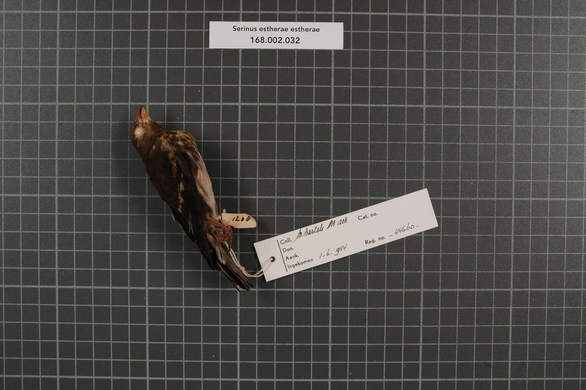 Serinus estherae estherae (Finsch, 1902)